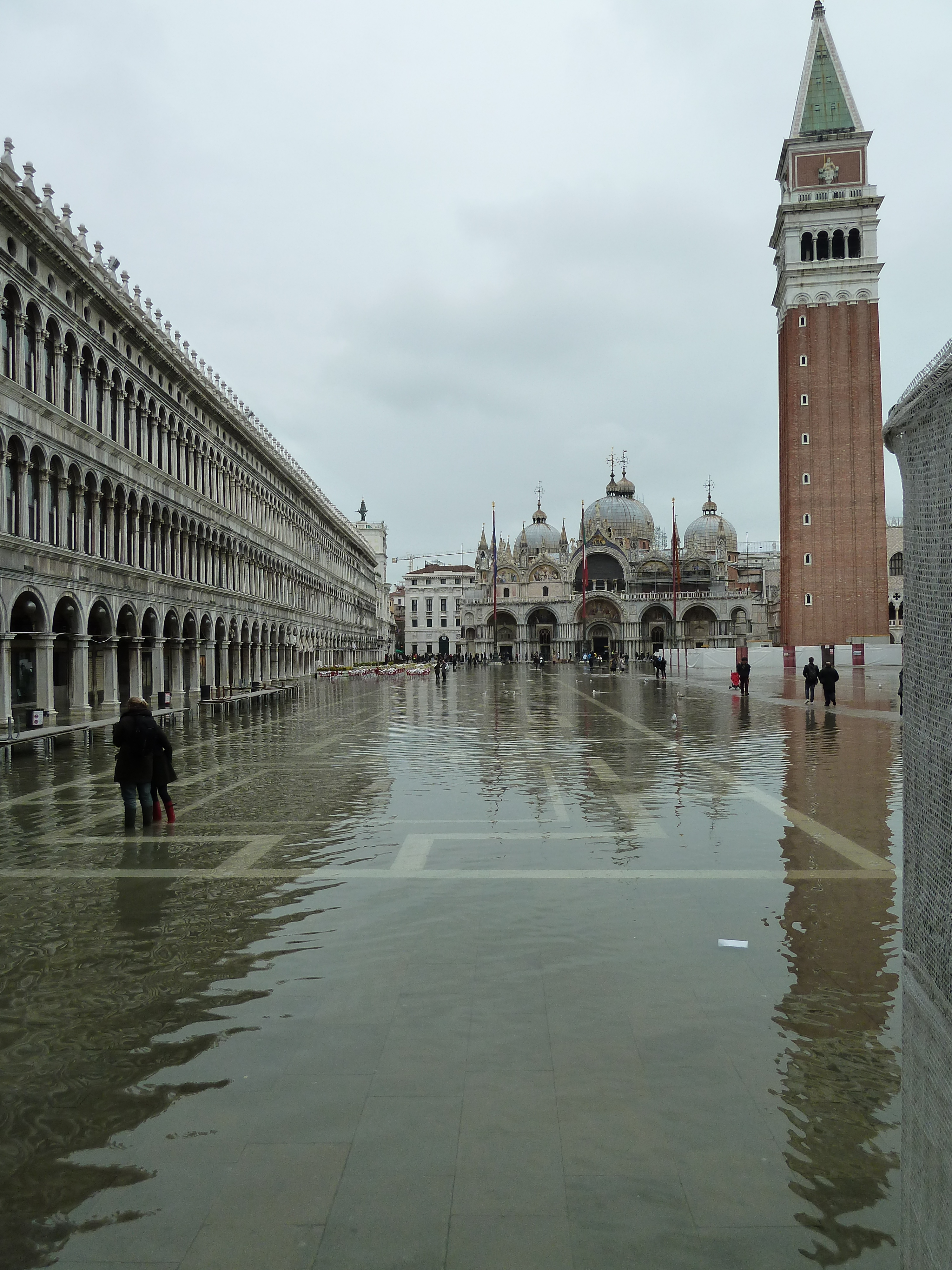 San marco aqua alta